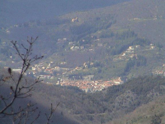 Vue prise depuis le massif de l'Oiselette de la ville dufr:Vigan 2004. Cevenol2